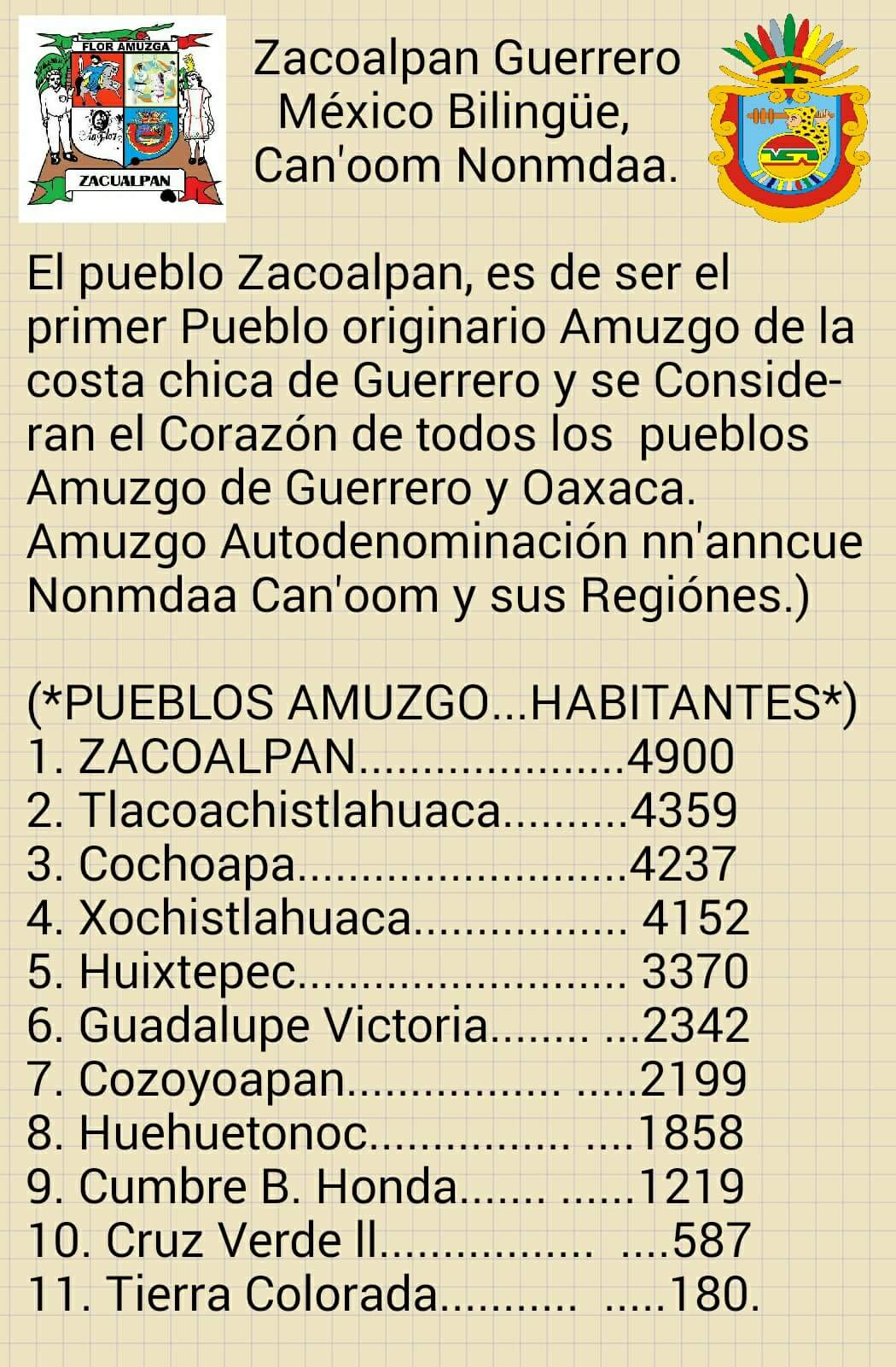 El pueblo de Zacoalpan Can'oom Nonmdaa Originario Amuzgo de la costa chica de Guerrero y consideran el Corazón de todos los pueblos Amuzgo de Guerrero México.